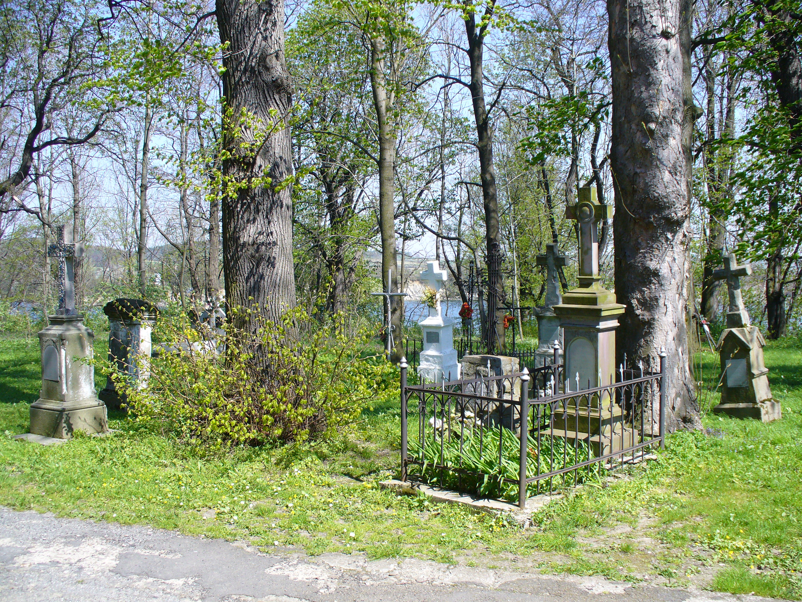 Sieniawa